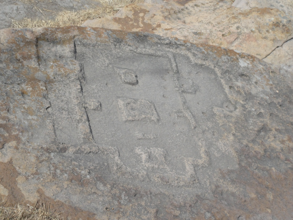 Template:Plazuelas model